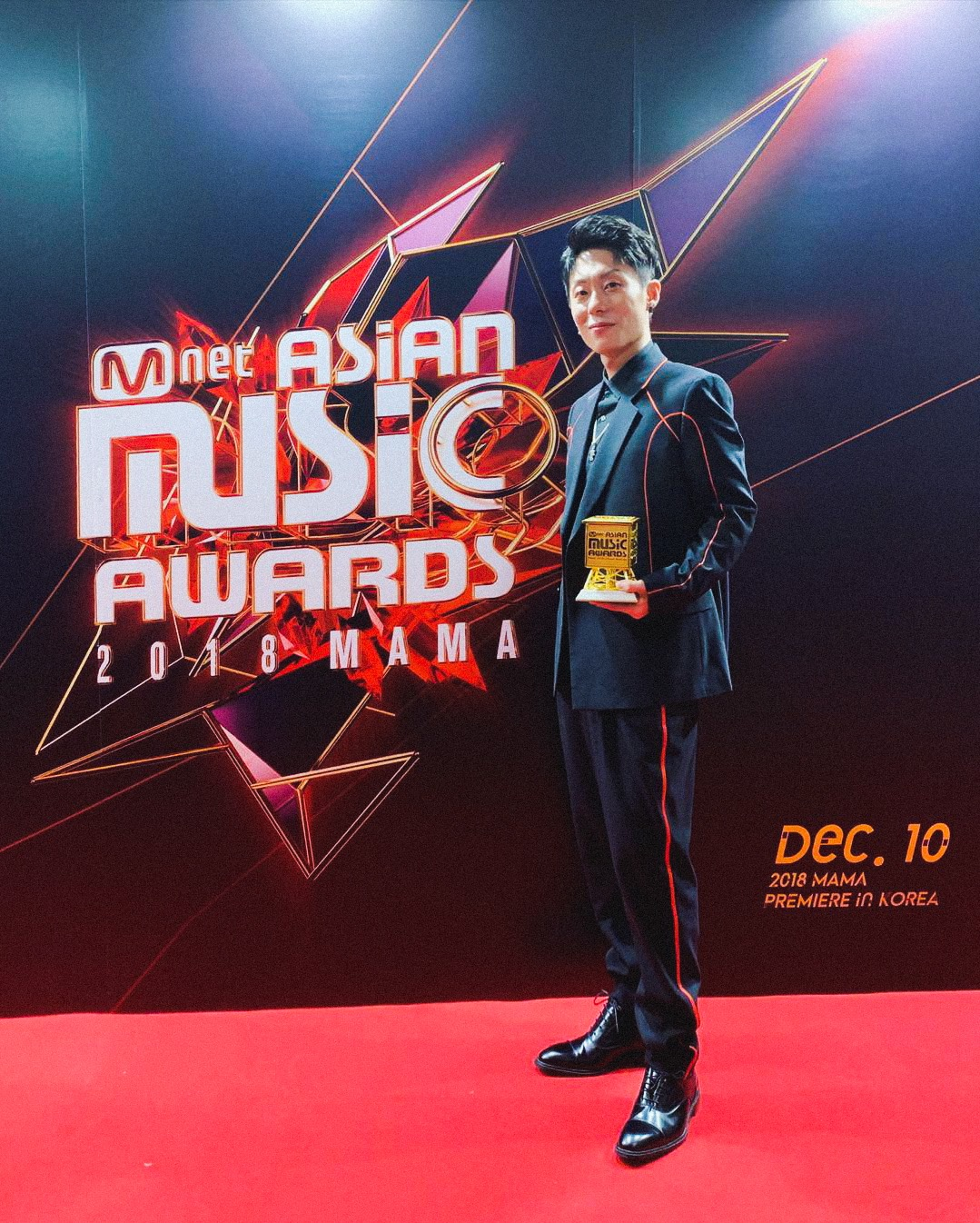 Dean Ting MAMA The Best New Asian Artist